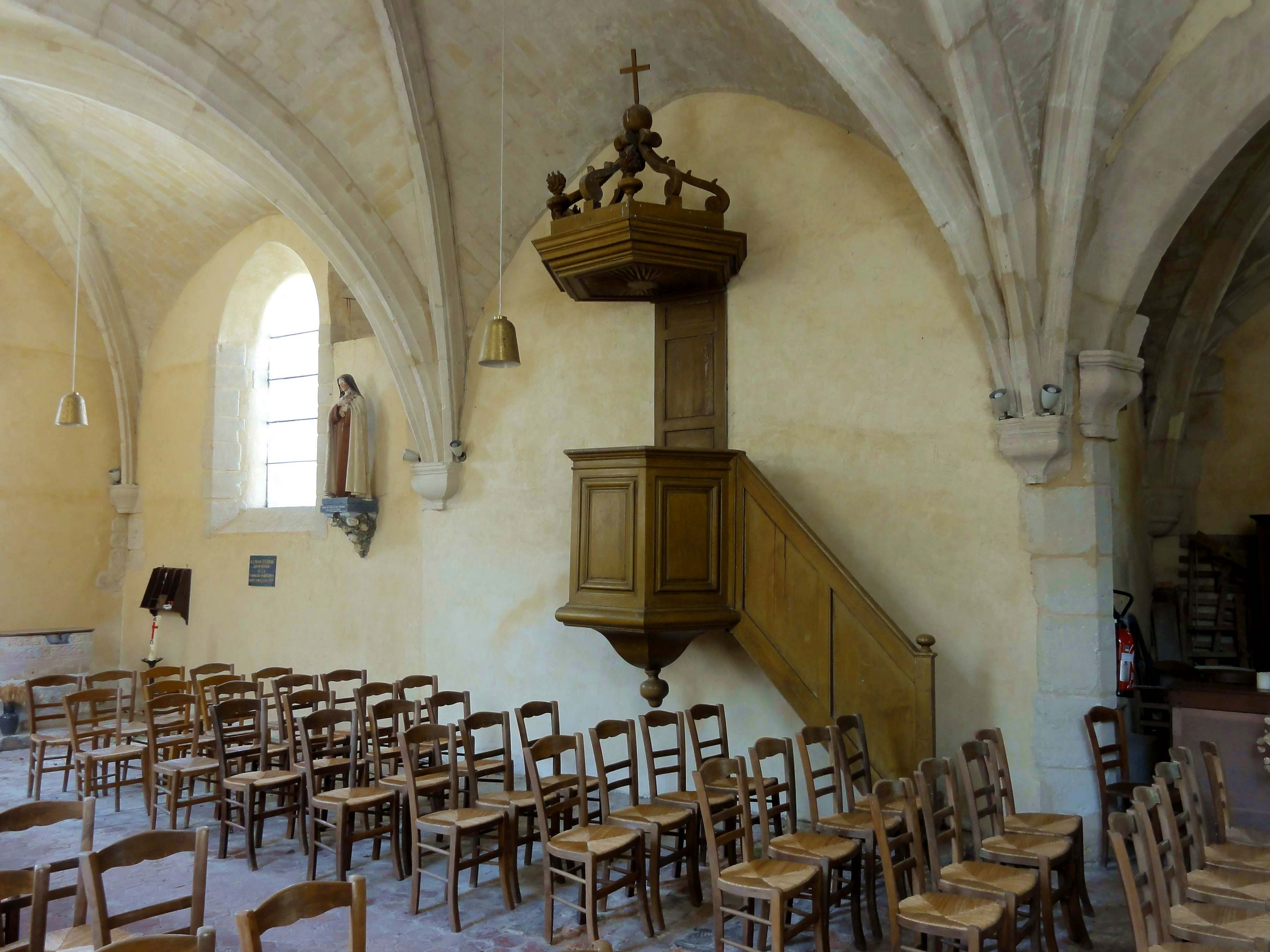 Intérieur de l'église (voir titre).